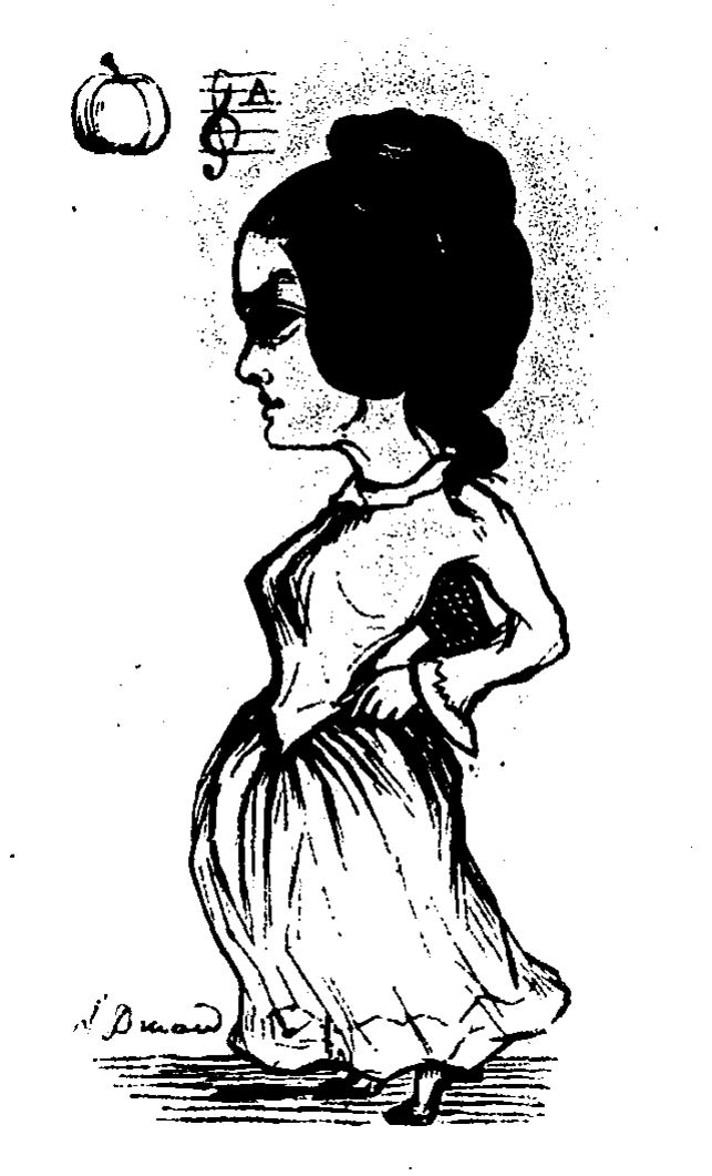 Élise Sergent alias la Reine Pomaré, illustration du livre "Les polkeuses" par Nick Polkmall (pseudonyme)